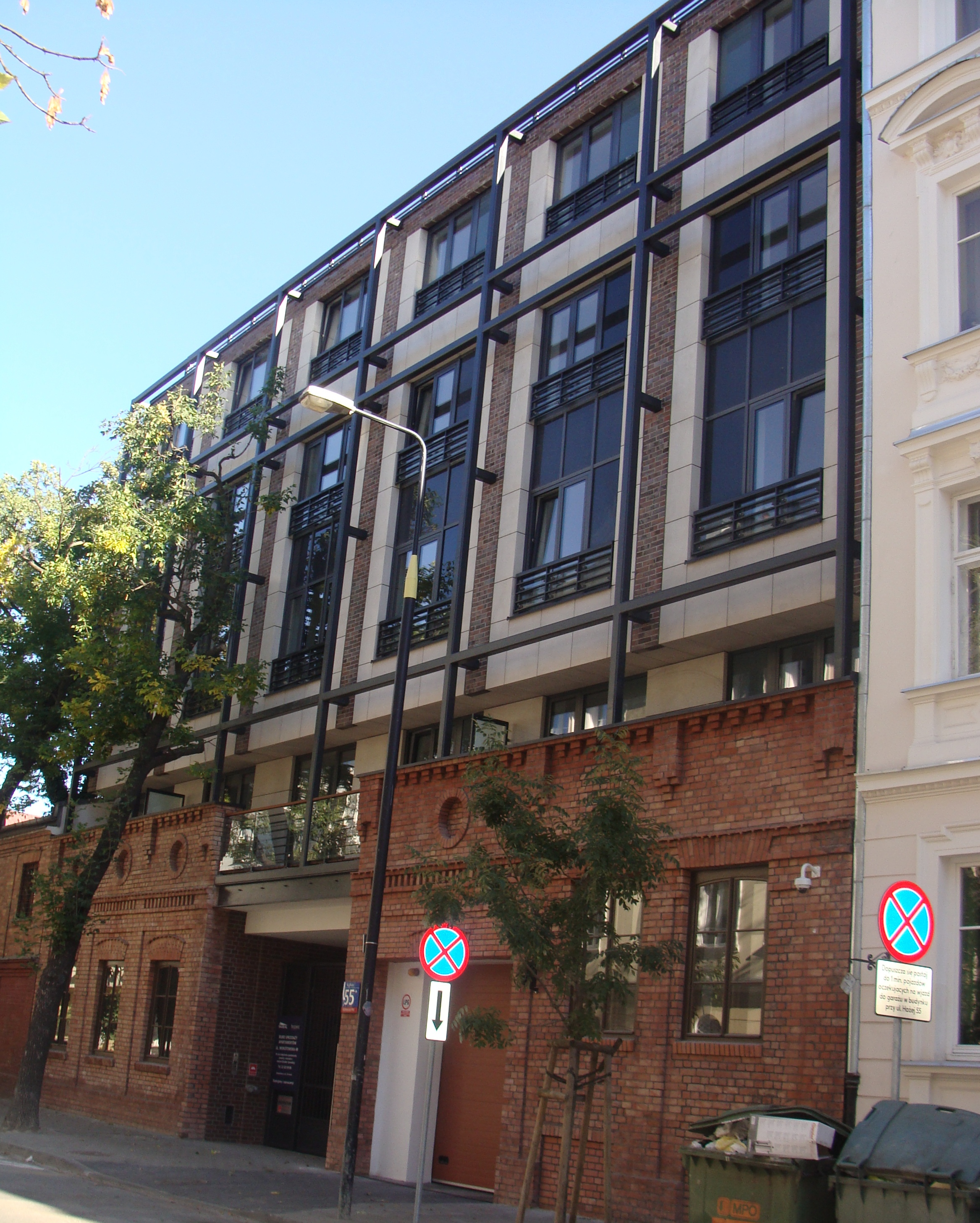 elewacje frontowe warszatatów fabryki braci Łopieńskich XIX/XX